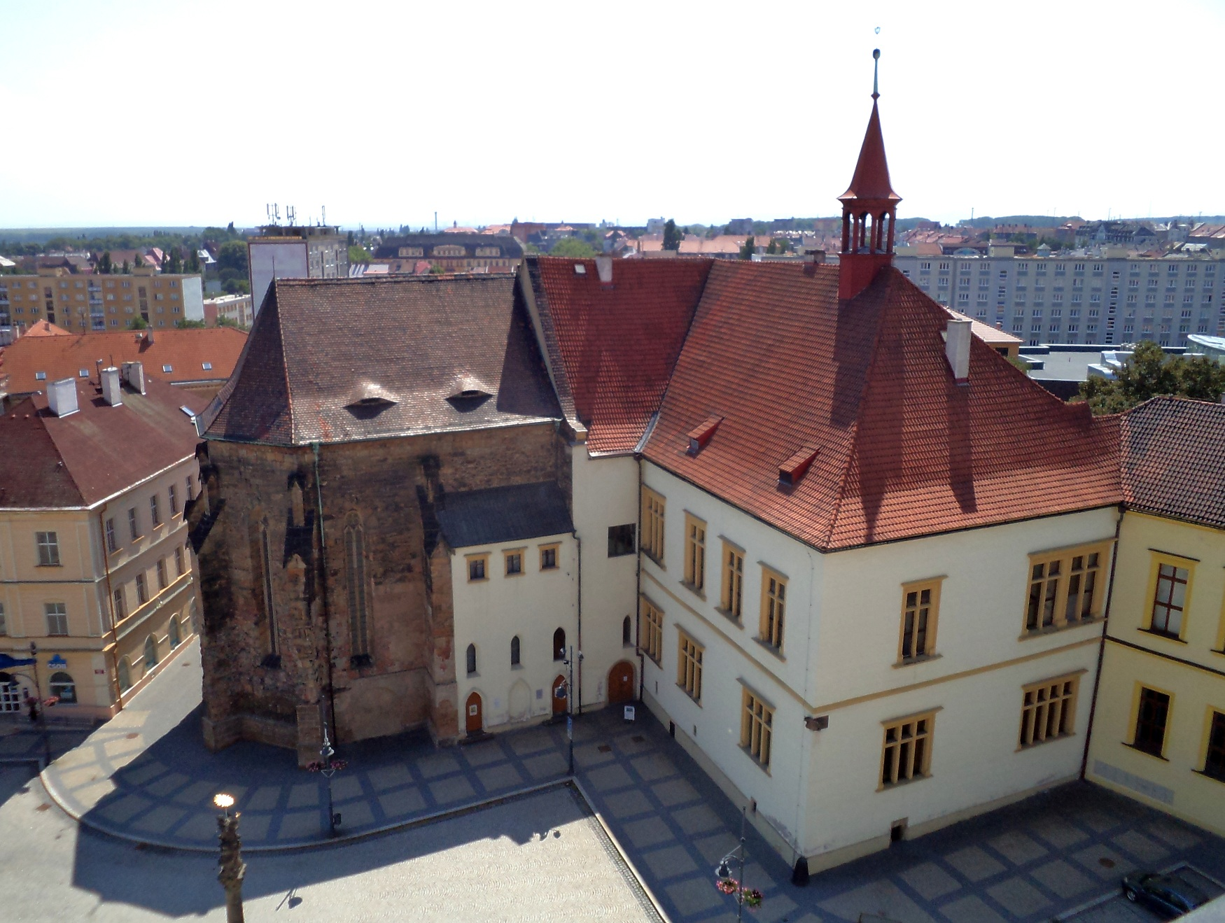 Chomutov - radnice a kostel sv. Kateřiny